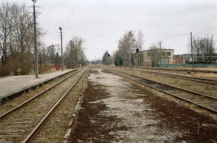 Mõisaküla raudteejaam (kevad 2005)